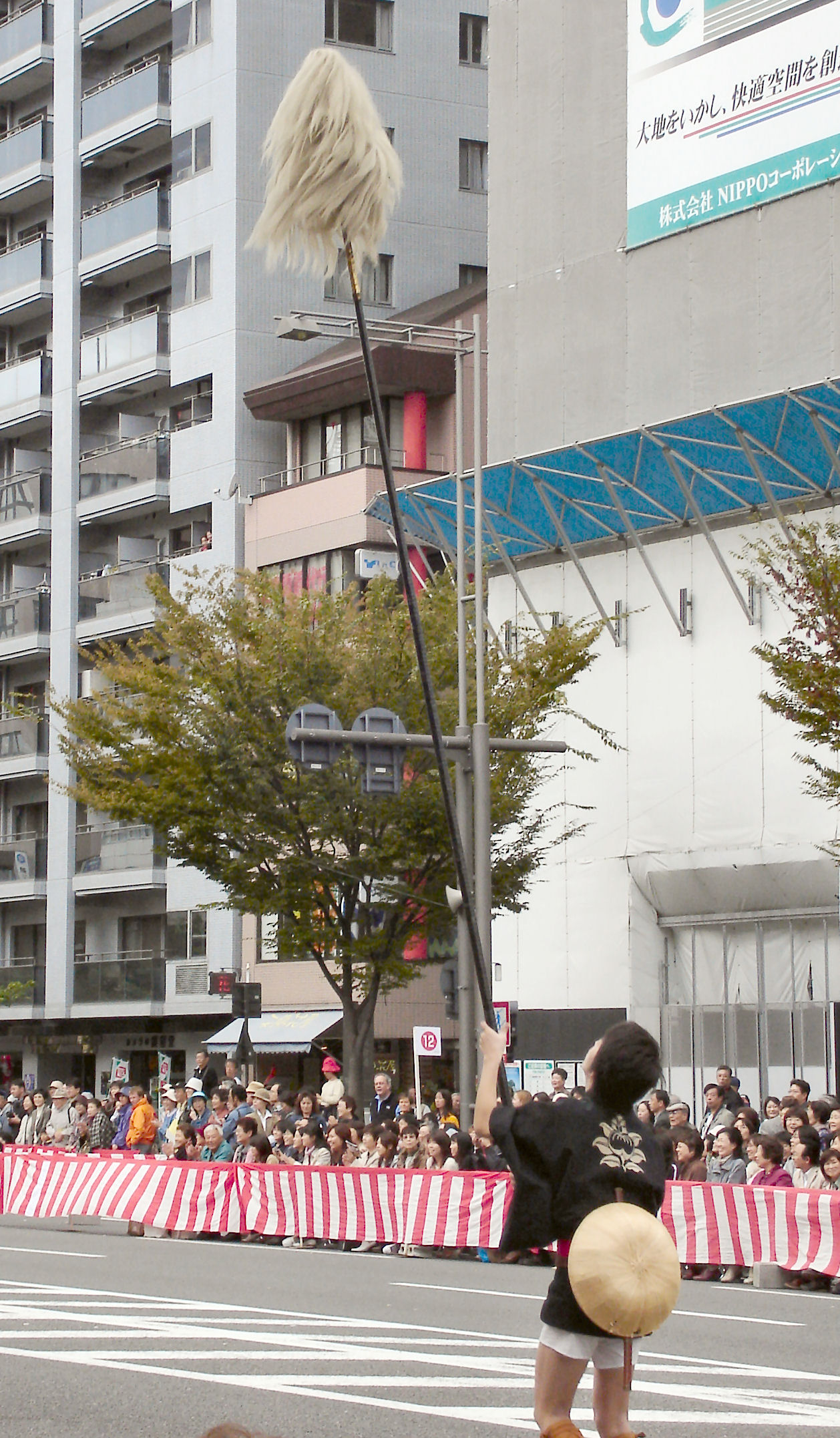 Jidai matsuri Keyari